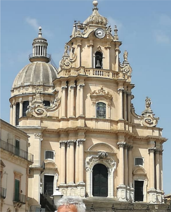 Duomo di San Giorgio a Ragusa